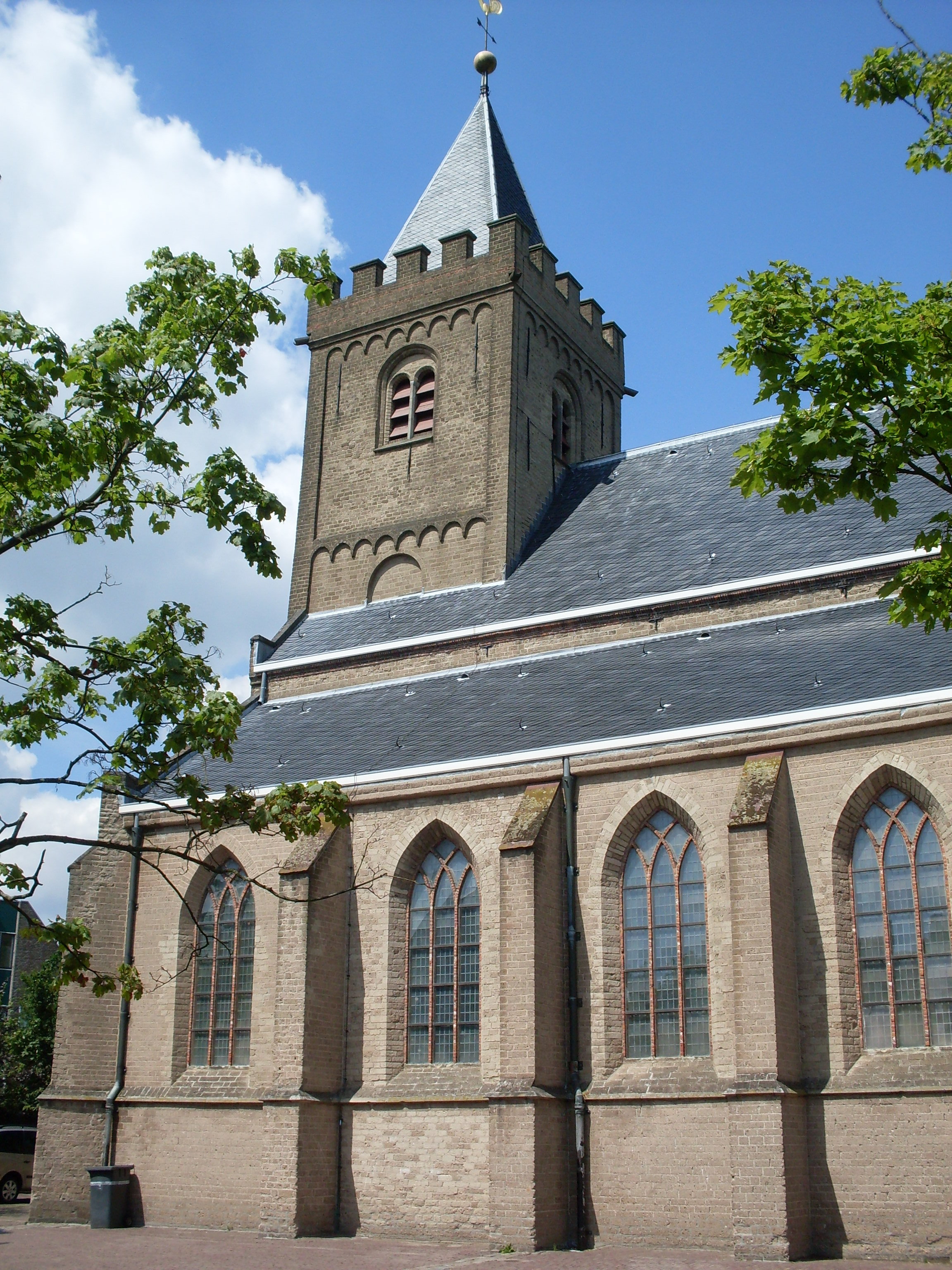 N.H. kerk te Muiden.